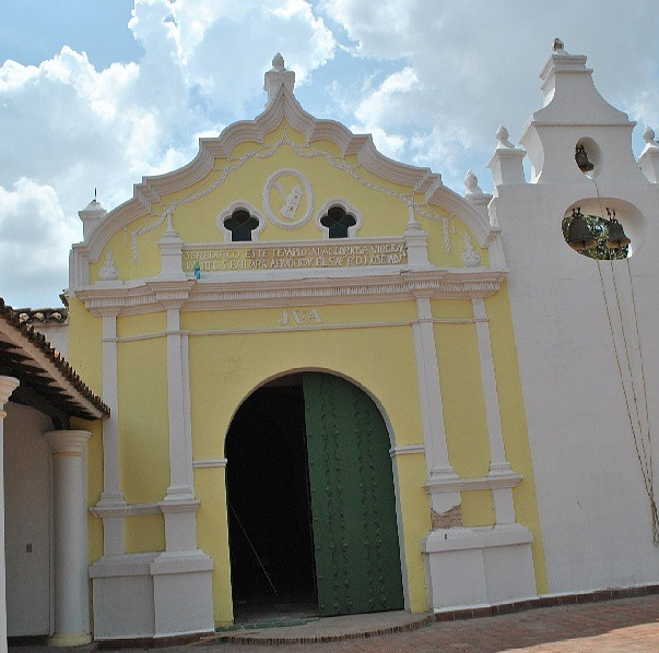 Iglesia